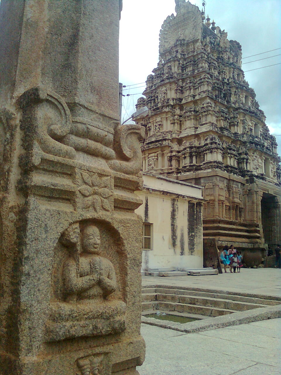 Sri rangapatna